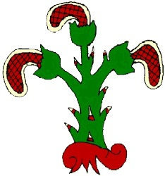 Glifo de Metzquititlán, Hidalgo